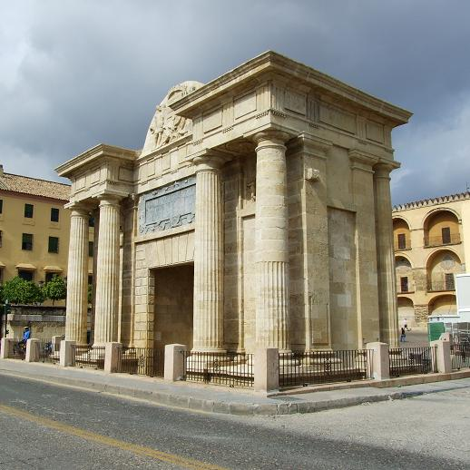 Puerta del Puente, Córdoba (España)